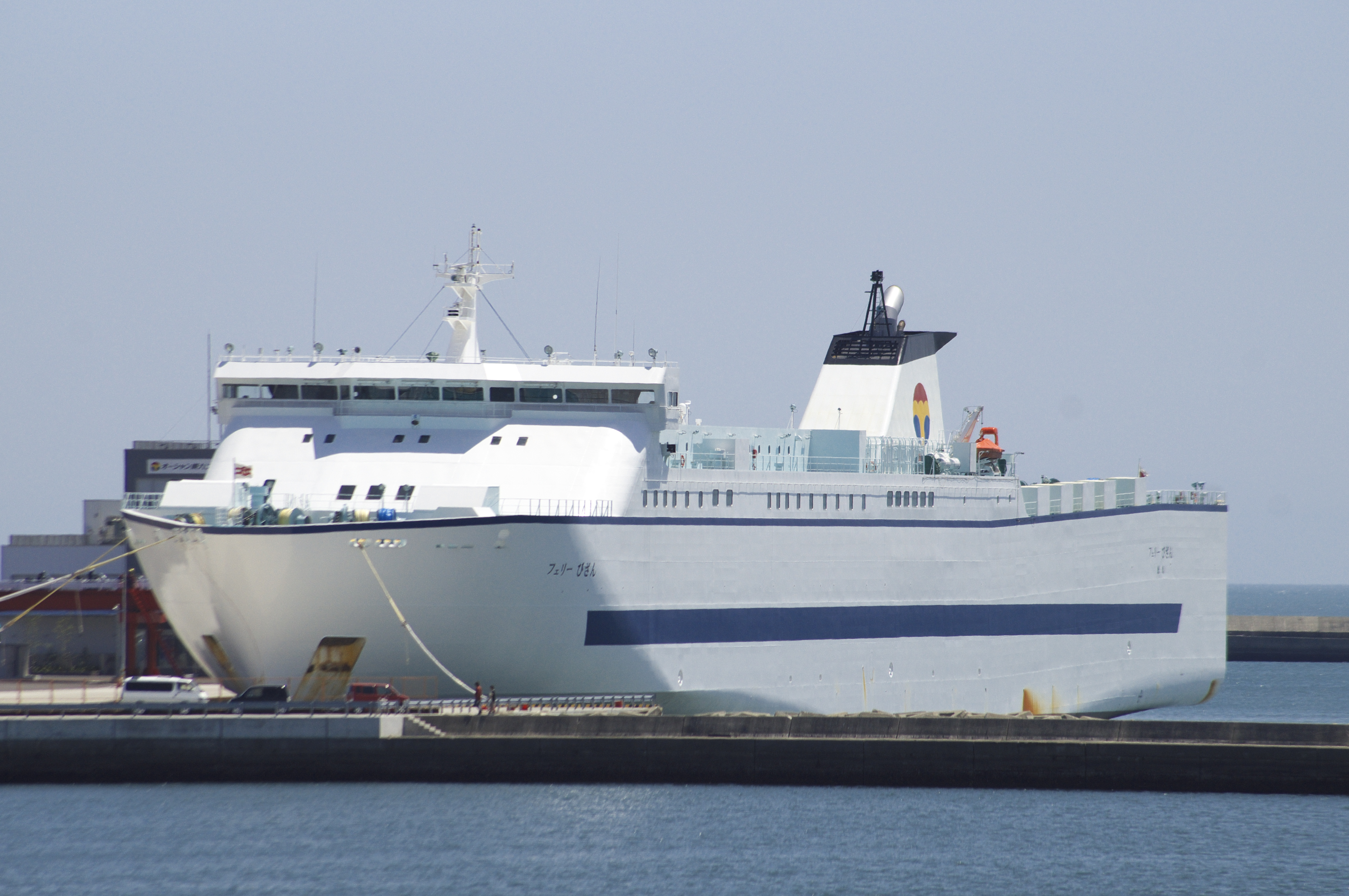 オーシャン東九フェリー「フェリーびざん」（2016年5月5日,徳島港沖洲フェリーターミナル）